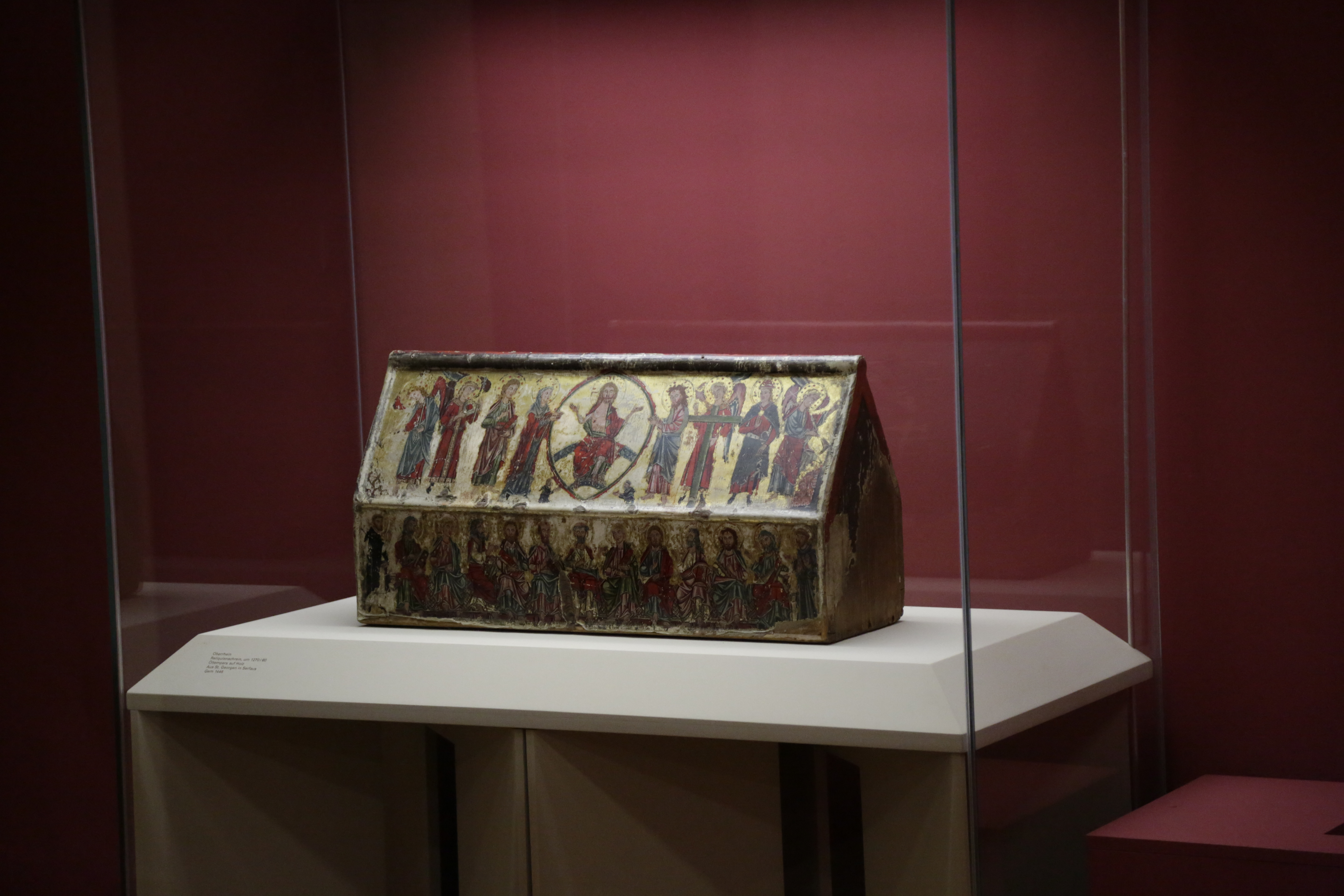 Der Reliquienschrein aus der katholischen Filialkirche des heiligen Georg ob Tösens ist heute im Tiroler Landesmuseum Ferdinandeum in Innsbruck ausgestellt. Er wird auf 1270/80 datiert und ist als Öltempera auf Holz gestaltet.